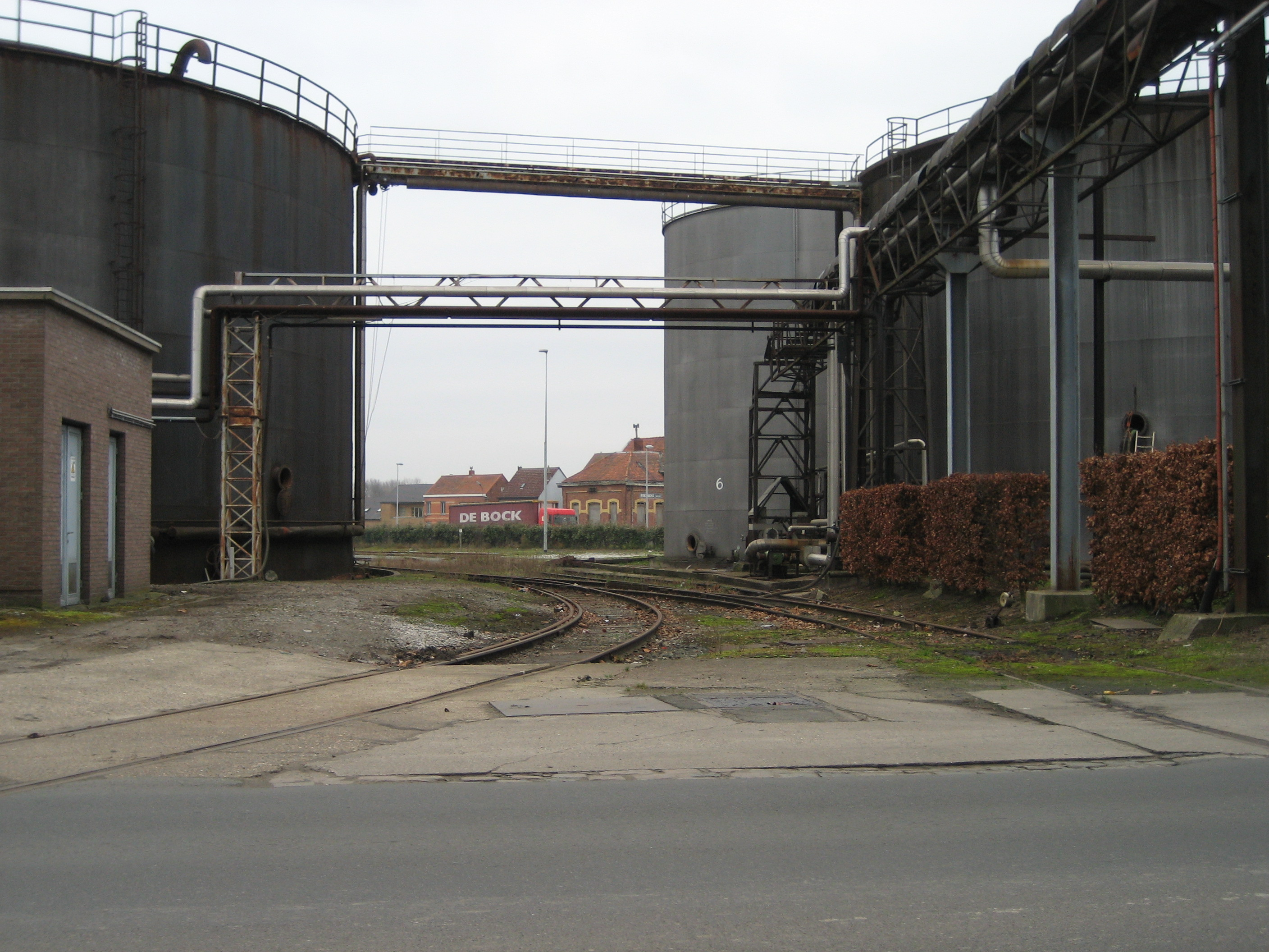 Lijn 77 Moerbeke, suikerfabriek